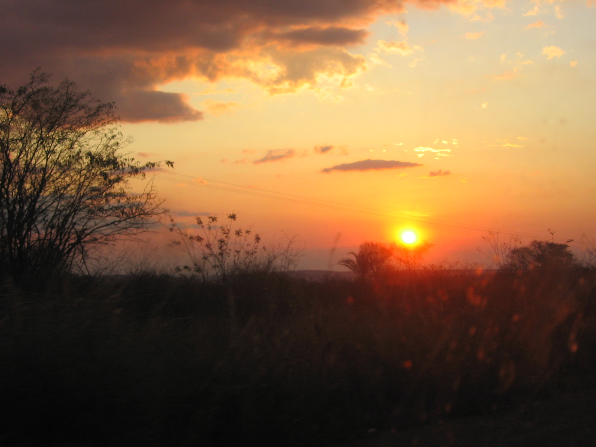 Por do sol em Bom Jesus da Lapa, em outubro de 2007.